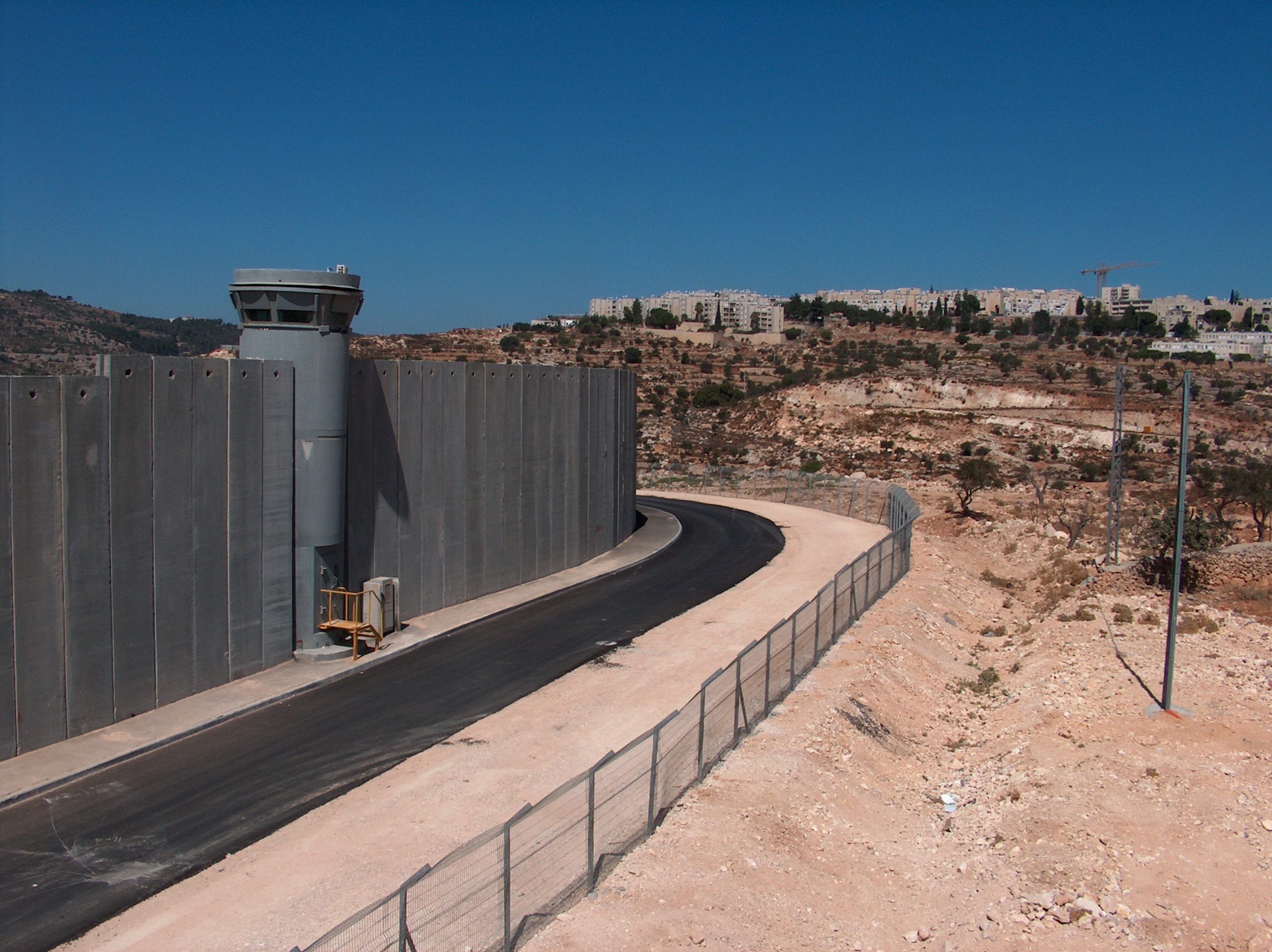 برگرفته از ویکی پدیای عبری [1]